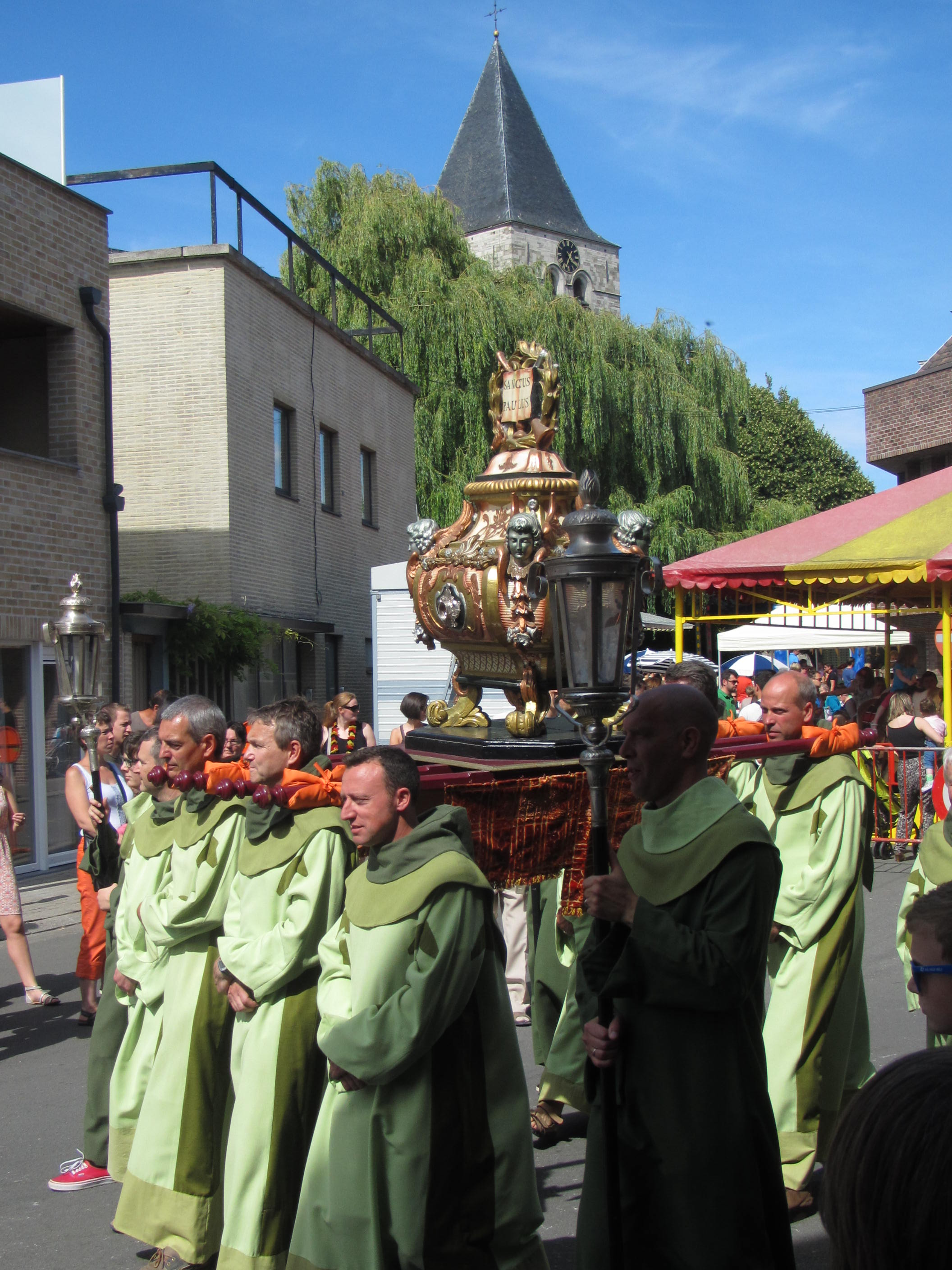 Het vergulde, houden relikwieschrijn van Sint-Paulus dat rondgedragen wordt in de processie, omringd door flambeeuwdragers Op de achtergrond de toren van de Sint-Pauluskerk als ook de attracties van de zomerkermis van Opwijk